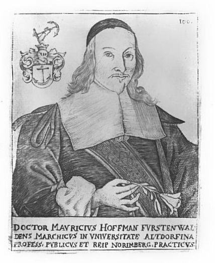 Bildnis Moritz Hofmann (1621–1698)